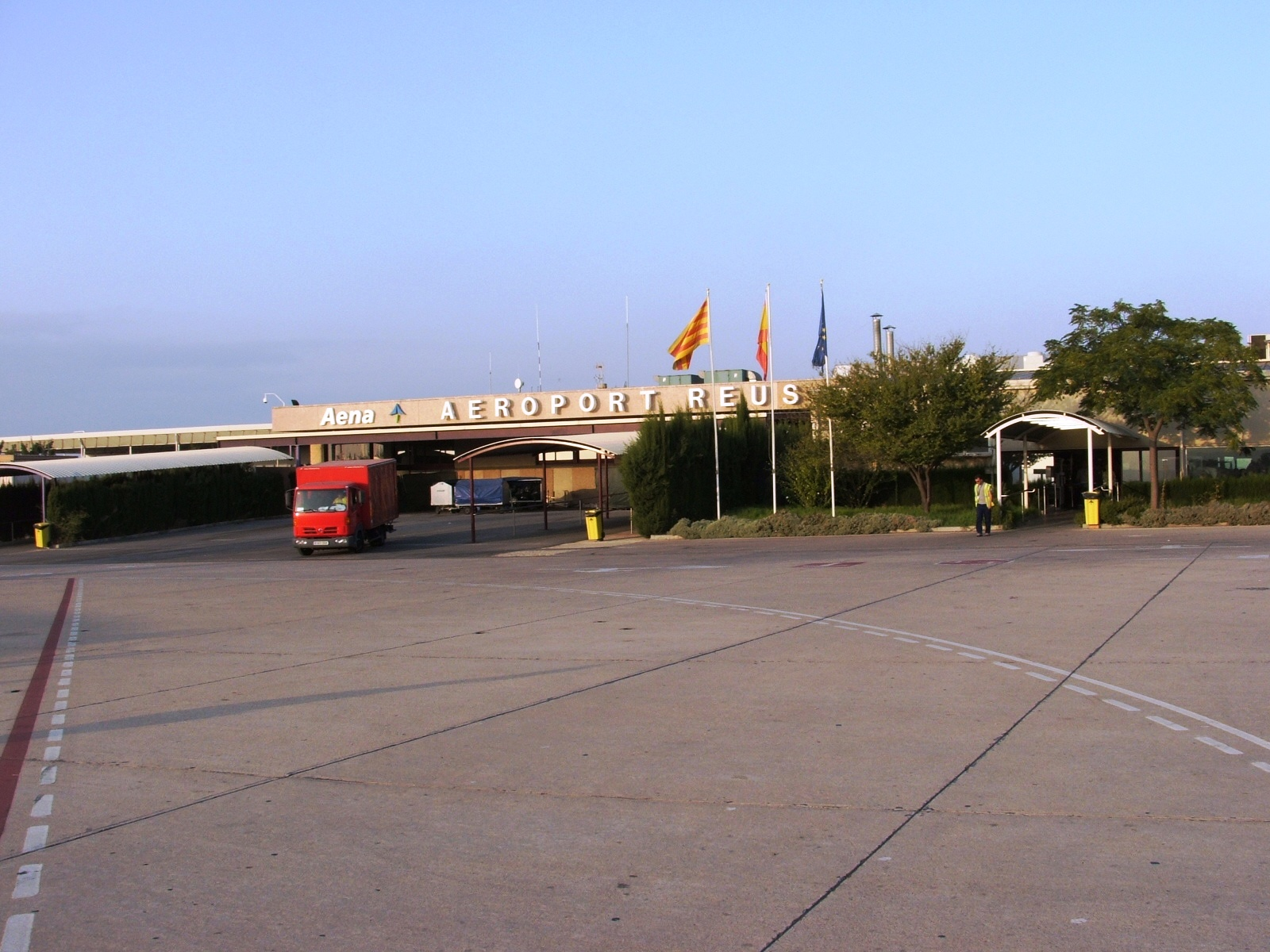 Reuso oro uostas